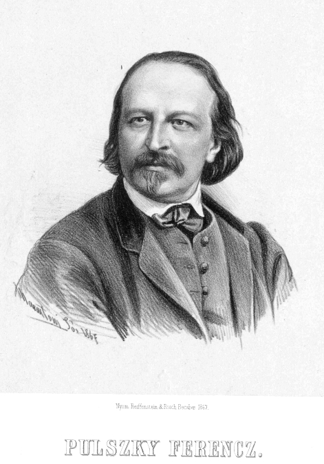 Pulszky Ferenc portré